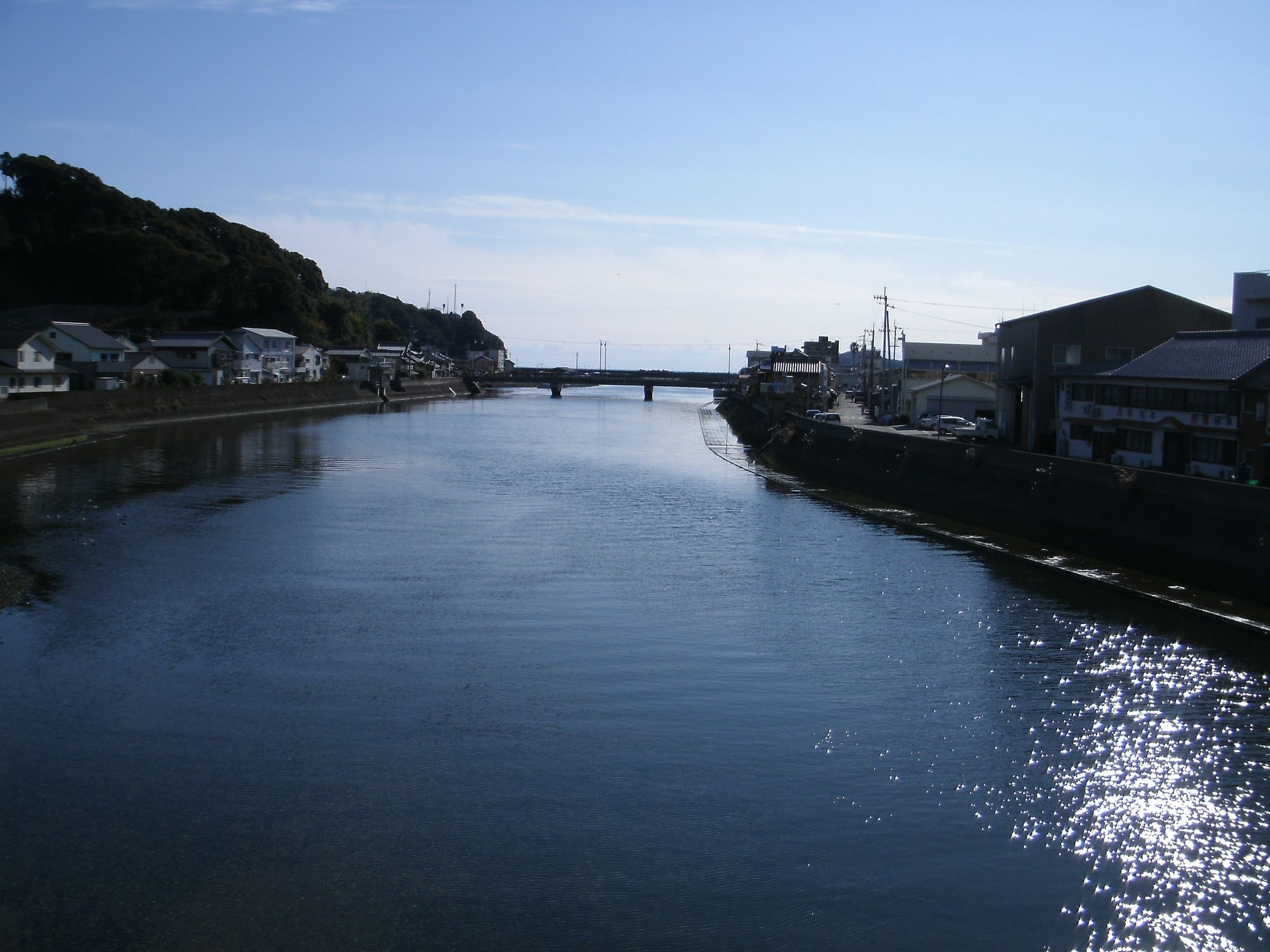 牟岐川 海部病院付近から南望